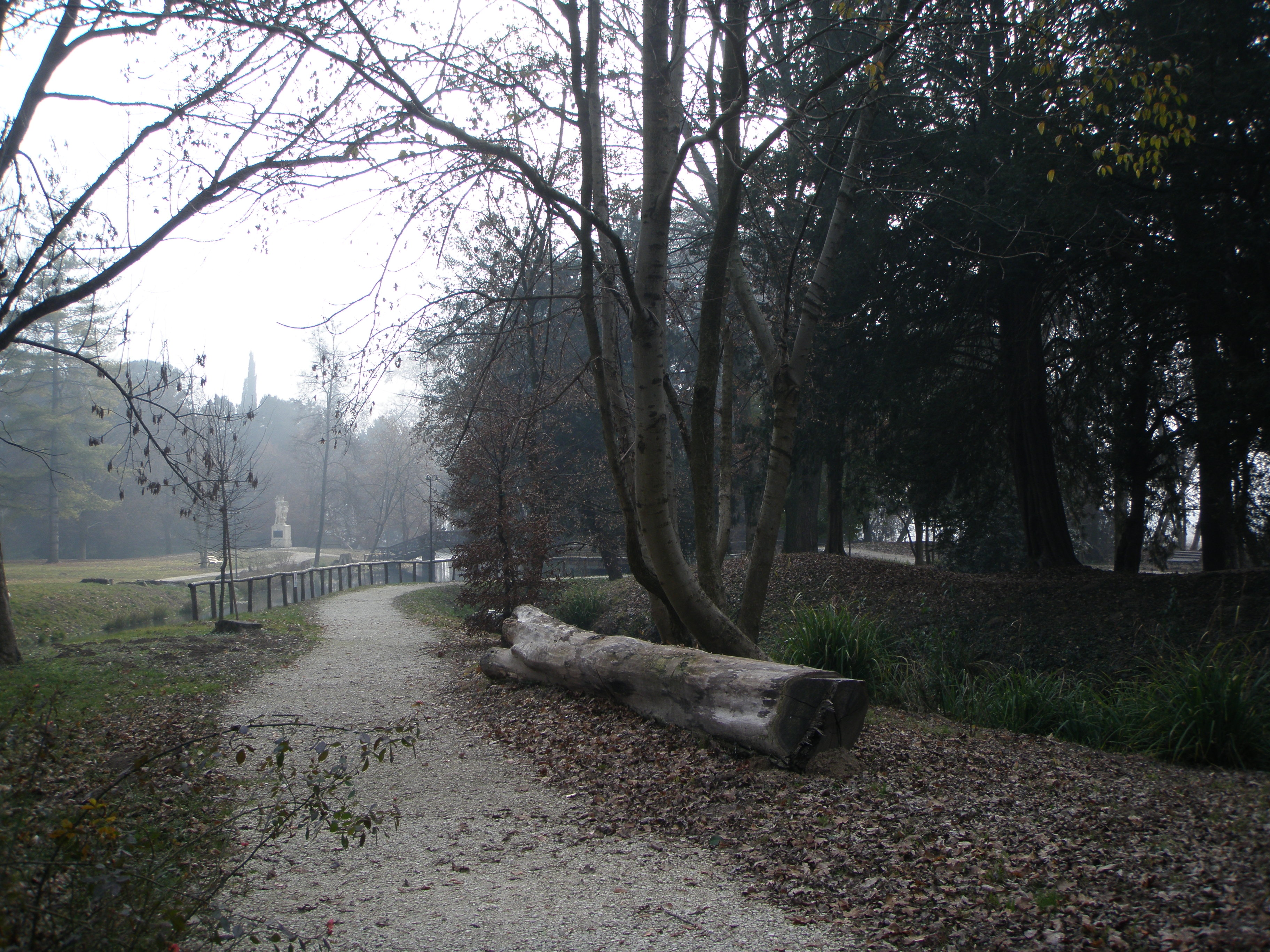 Vista del parco di villa capello galliera veneta